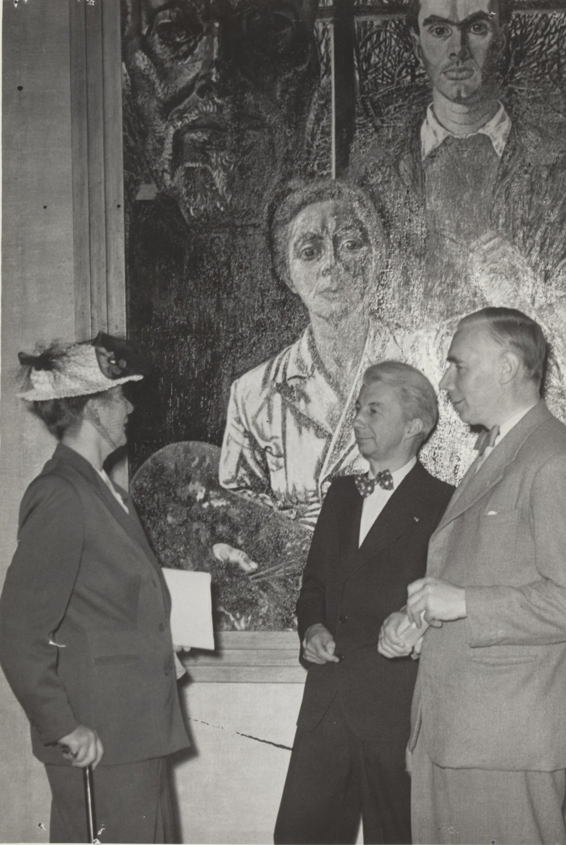 In het Stedelijk Museum te Amsterdam is de Charley Toorop tentoonstelling geopend door de heer A.M. Hammacher. Vlnr Charley Toorop, jhr Sandberg en A.M. Hammacher voor een van haar laatste schilderijen "Drie Generaties", voorstellende haar vader Jan Toorop, de schilderes zelf en haar zoon Datum 29 juni 1951